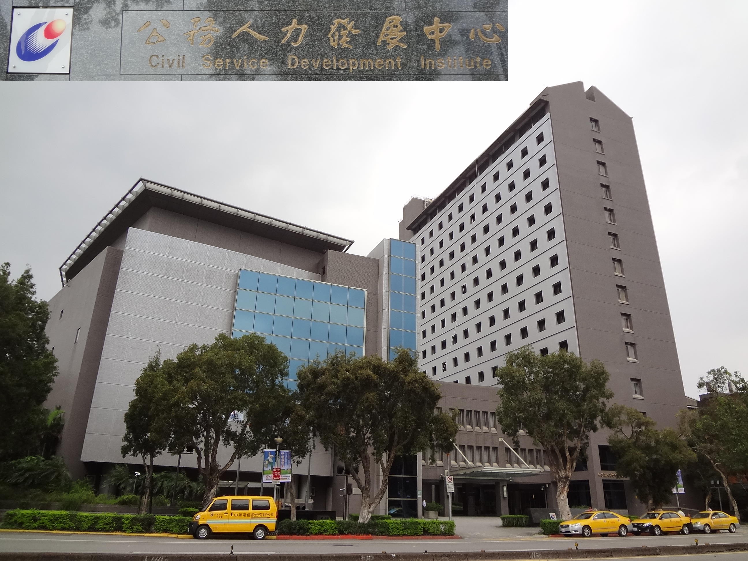 中華民國行政院人事行政總處公務人力發展中心，位於臺北市大安區新生南路三段30號。